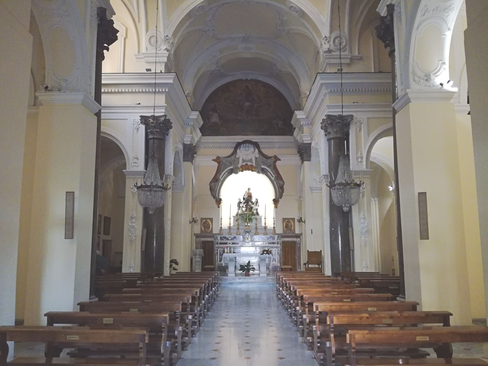 Scorcio dell'interno S. Maria della Vittoria, Napoli